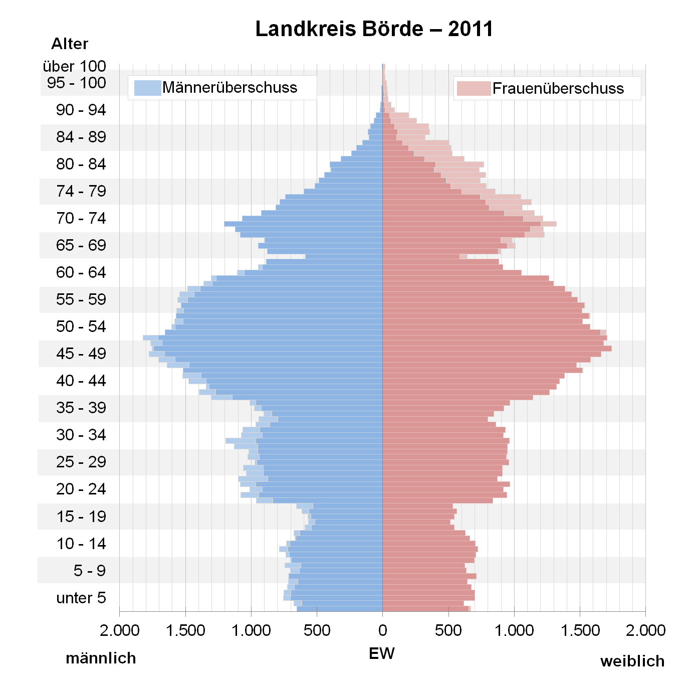 Bevölkerungspyramide des Landkreises Börde nach Zensus 2011.